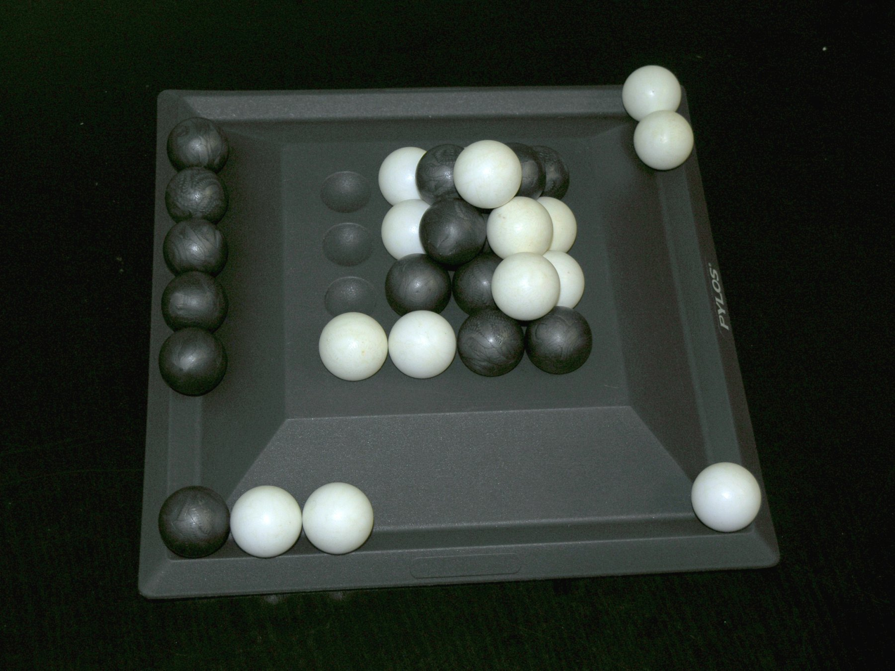 Pylos